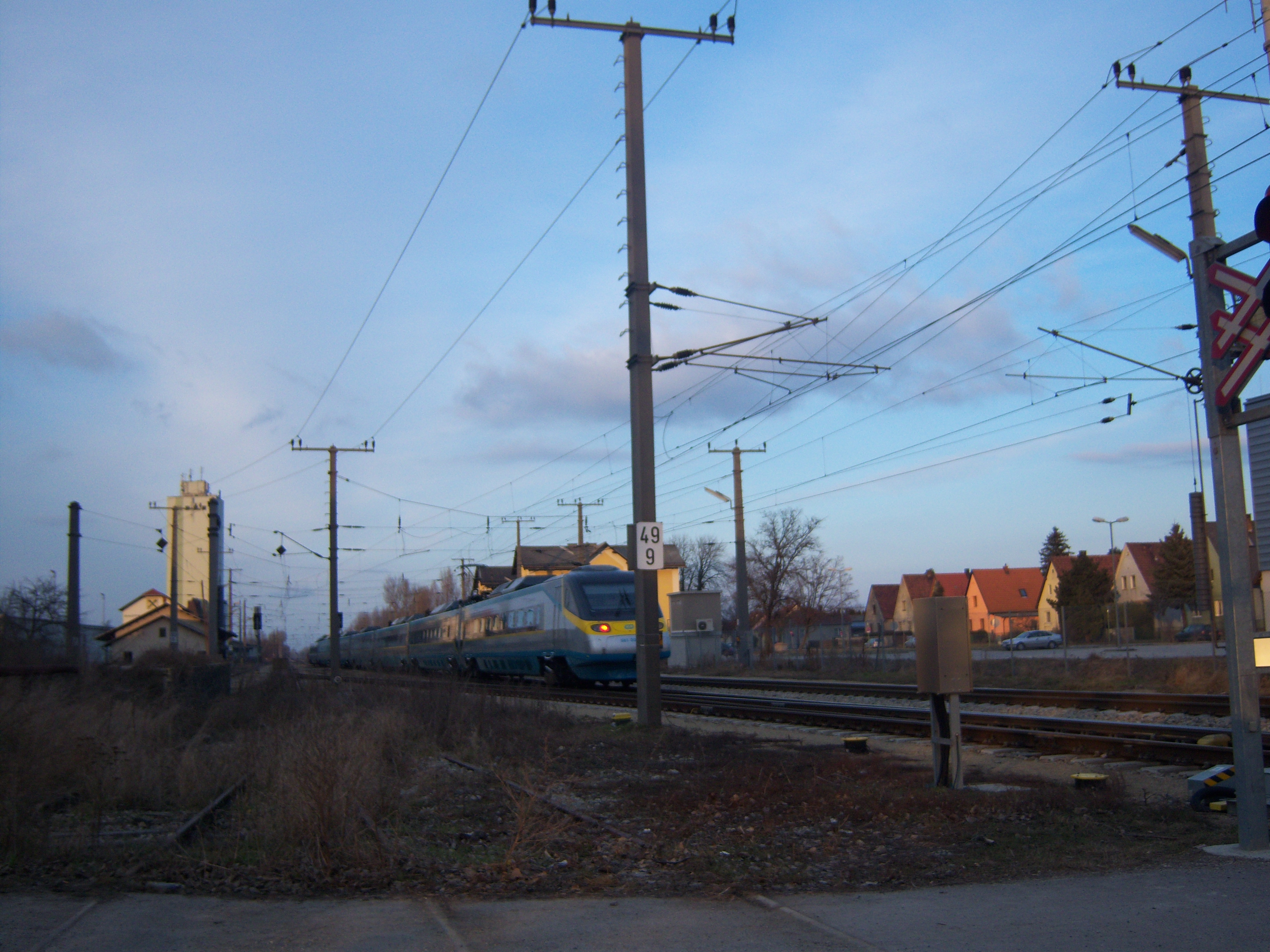 Pendolino und Güterzug im Bahnhof Dürnkrut